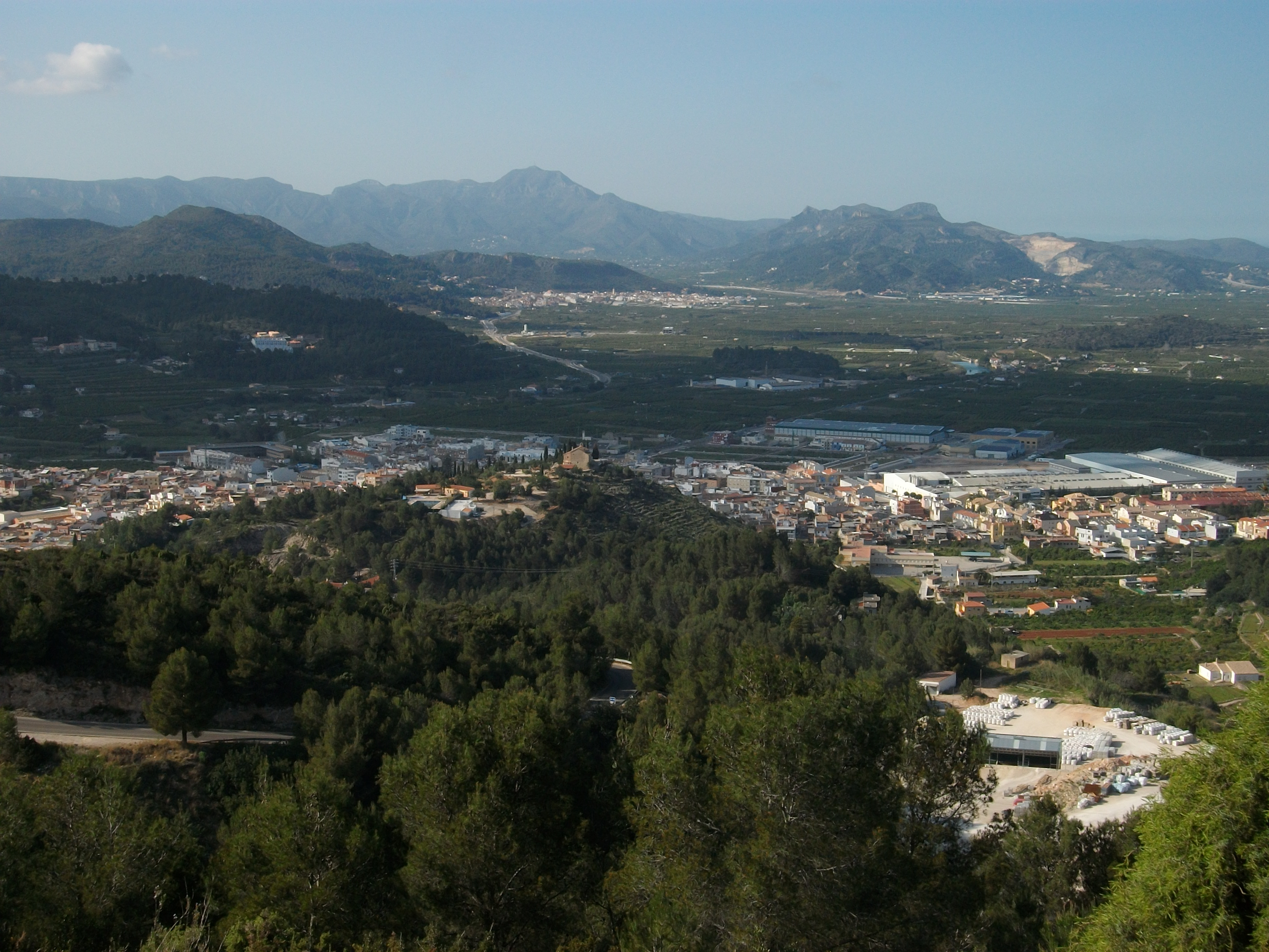 Vista de Vilallonga, la Safor, País Valencià.